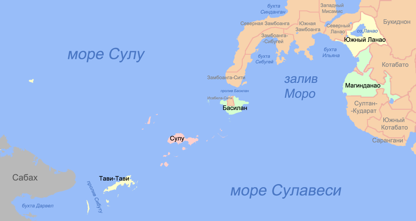 Карта провинций Автономного региона в Мусульманском Минданао (Филиппины)